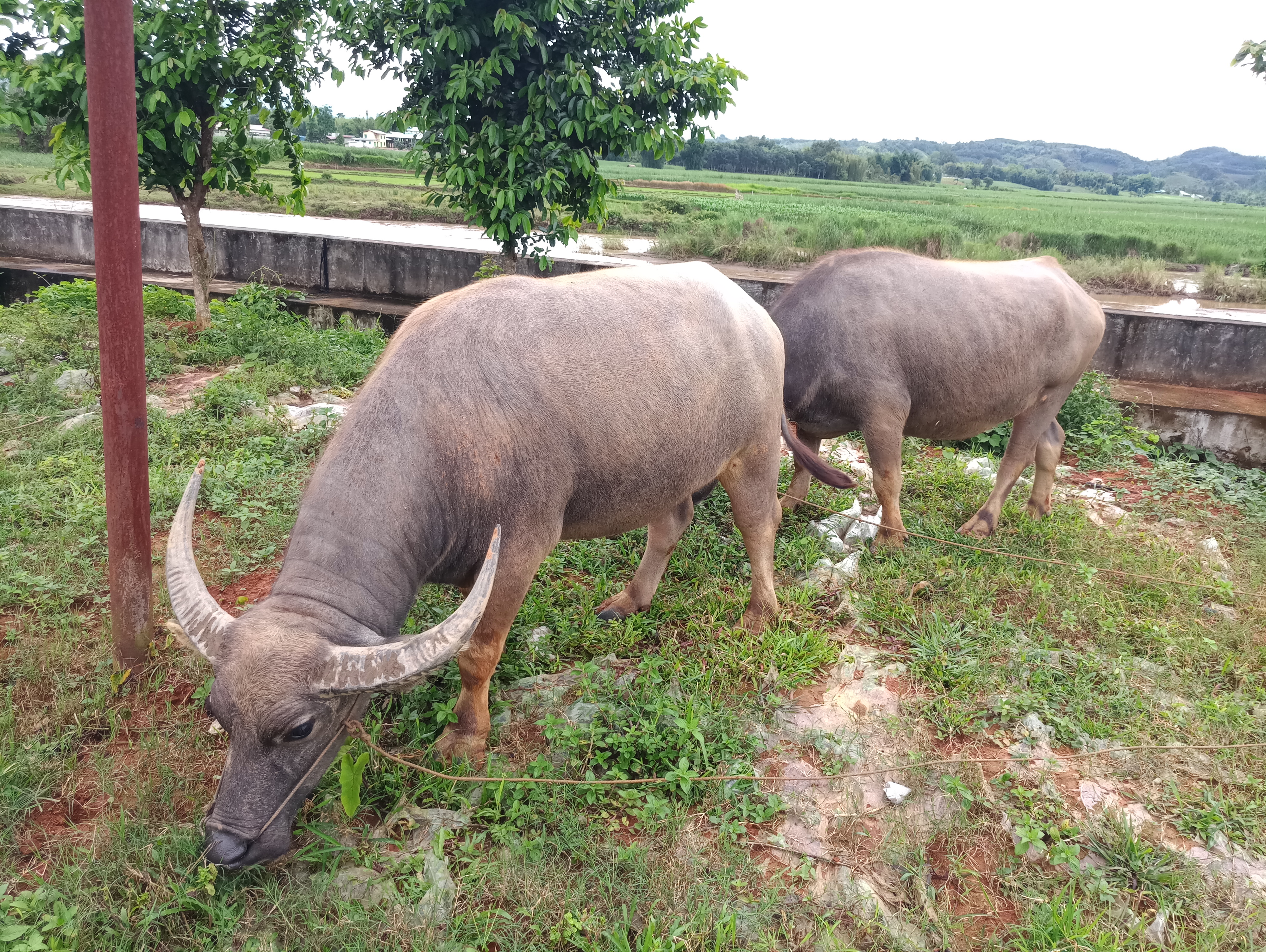 中文（中国大陆）: 弄岛镇-水牛